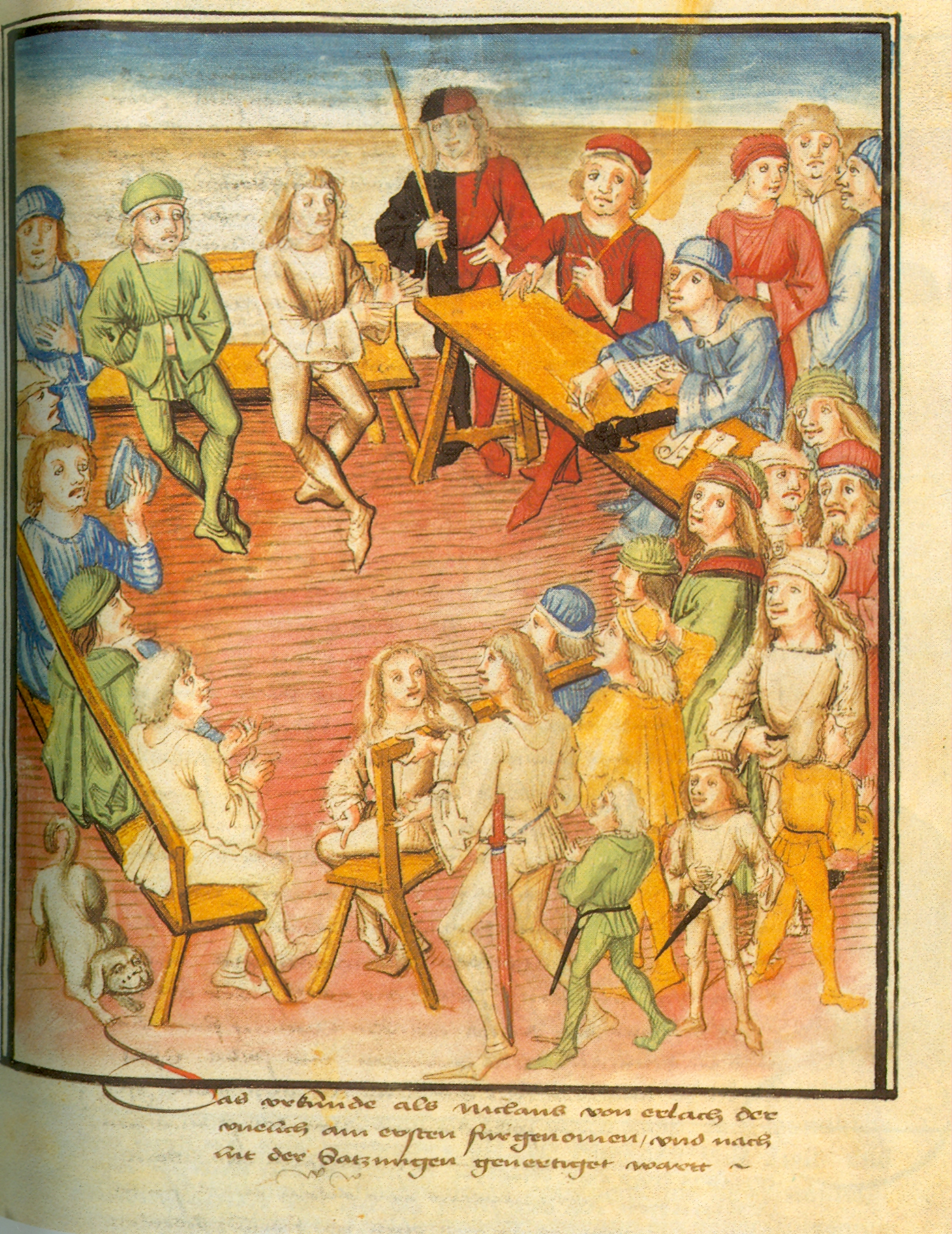 Twingherrenstreit